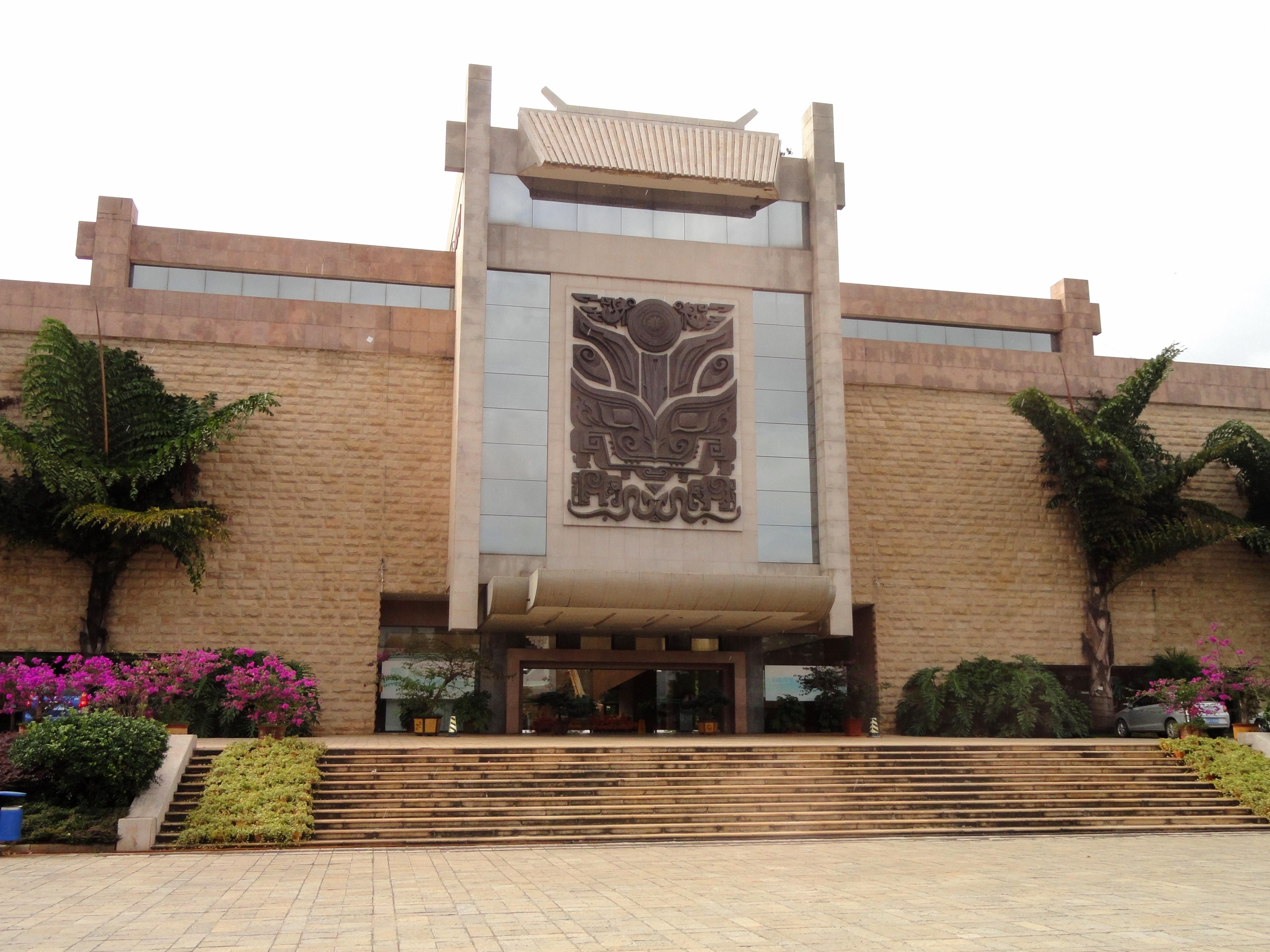 Yunnan Nationalities Museum, Kunming, Yunnan, China.